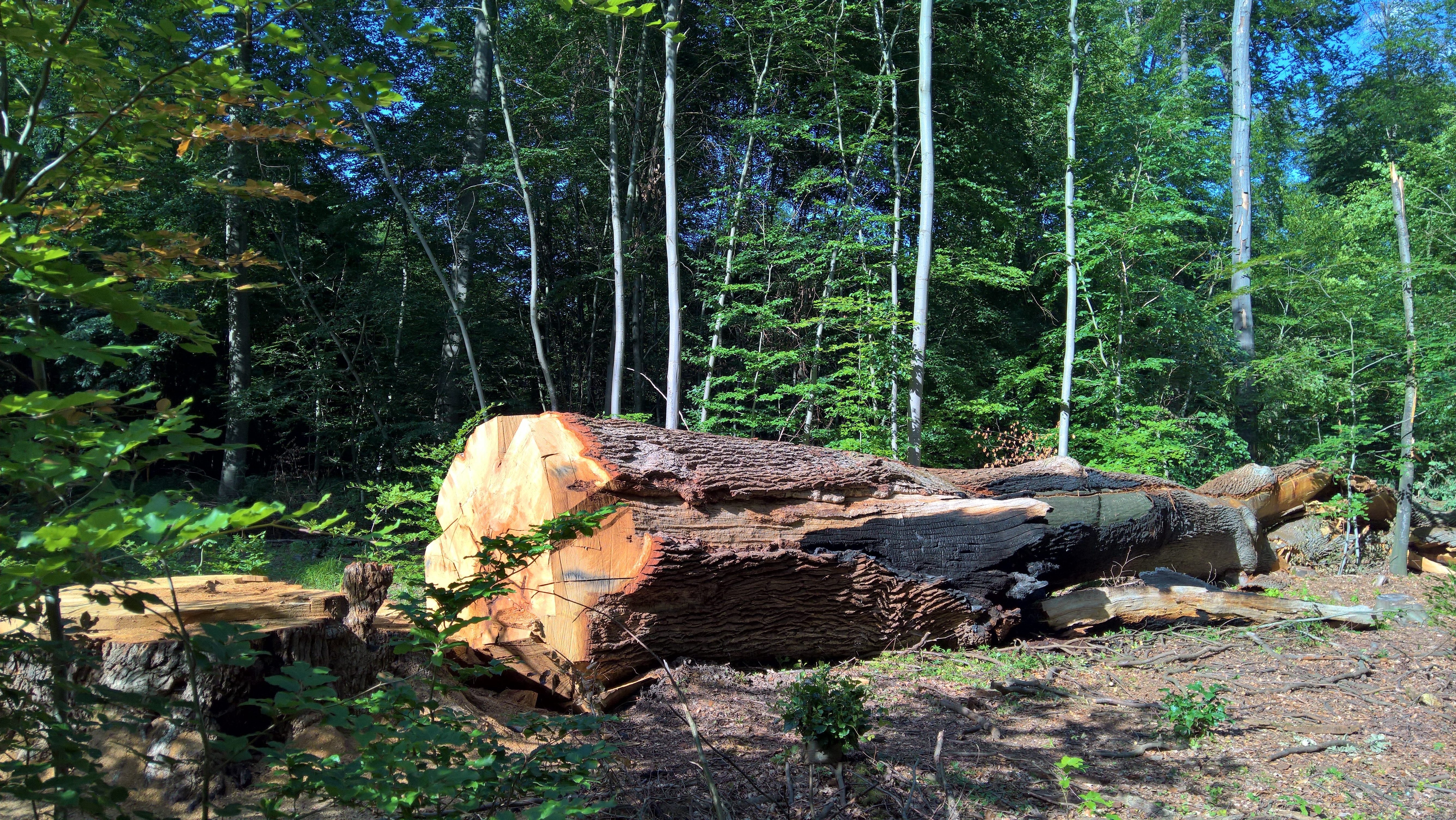 Das Naturdenkmal "Gambseiche" in Groß-Umstadt (Dieburger Forst) nach Zerstörung durch Blitzeinschlag, Feuer, Notfällung: Am 6. Juni 2019 durch Blitzeinschlag während eines Gewitters in Brand geraten. Über Kamineffekt und durch morsche Öffnungen und Höhlung trotz Löschversuchen der örtlichen Feuerwehren teilweise ausgebrannt. Der Leiter der Unteren Naturschutzbehörde gab daraufhin die Fällung frei, die fast zwei Stunden in Anspruch nahm. Eiche und Brandherd konnten dann vollständig gelöscht werden. Die Gambseiche verbleibt als Totholz im Wald.